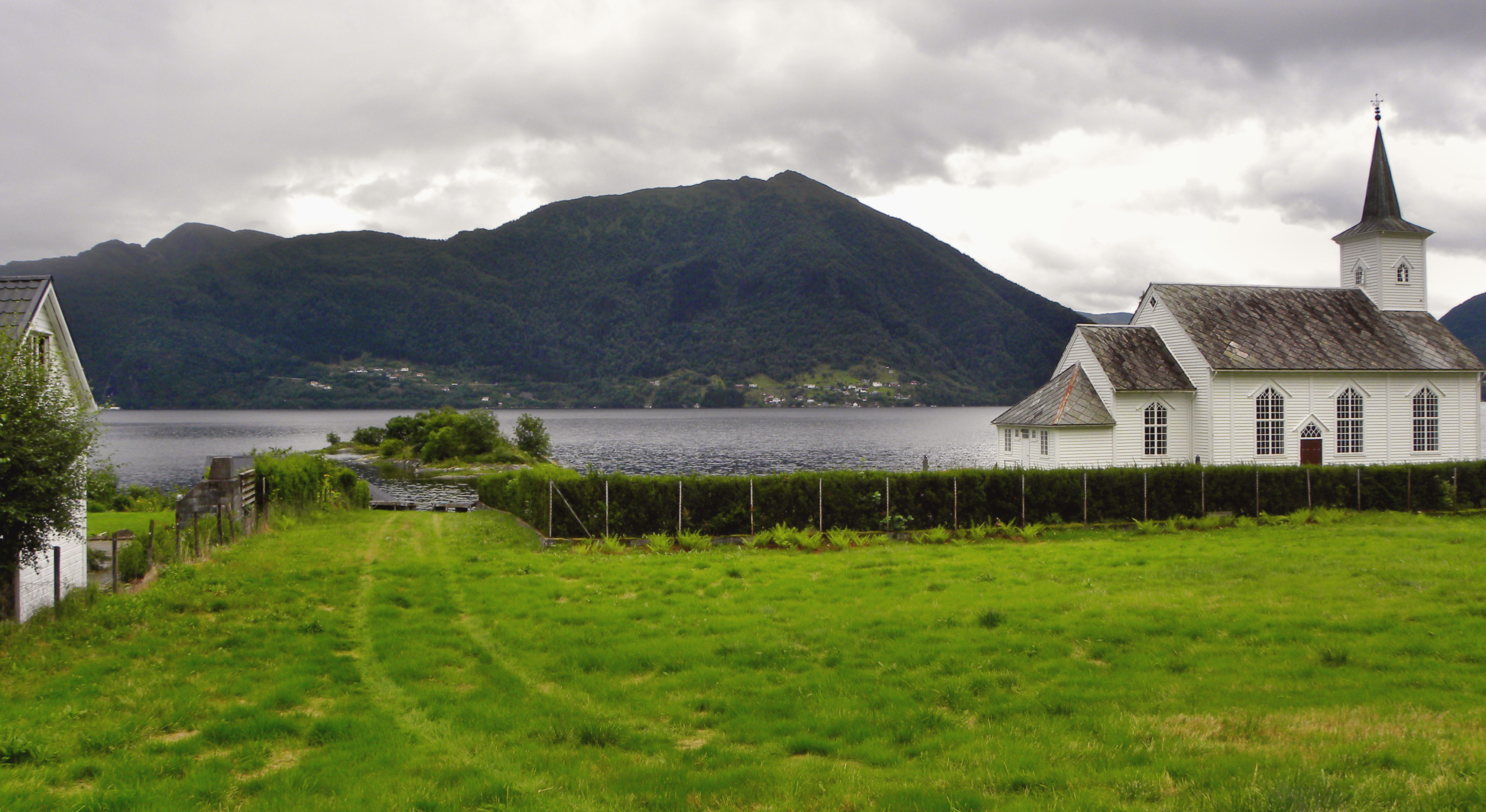 Bruvik kirkested i Sørfjorden i retning Hananipa.